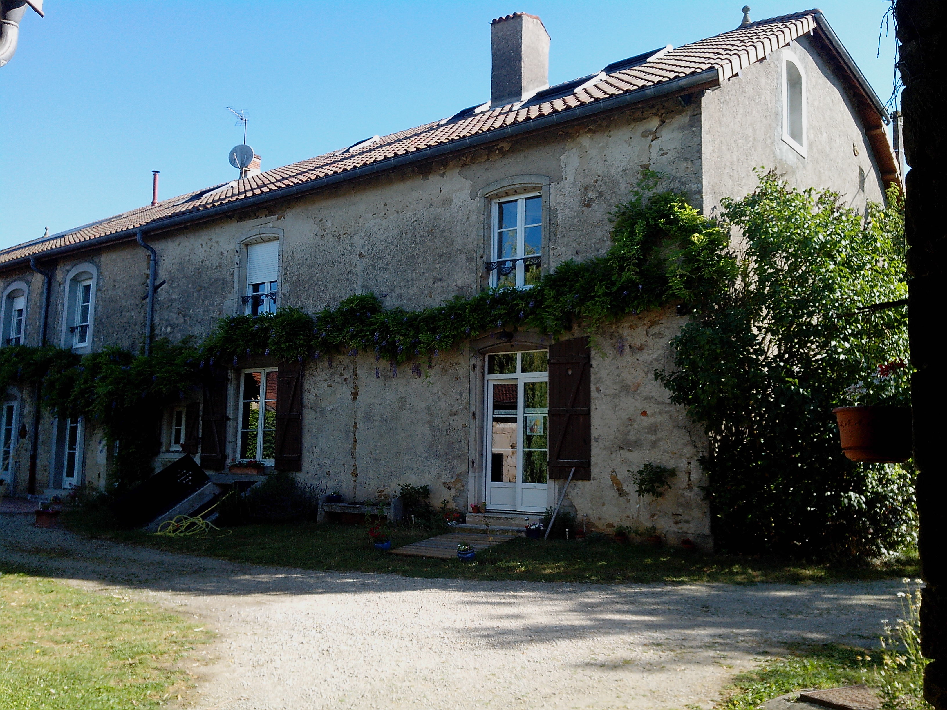 la maison de Marie-Clair